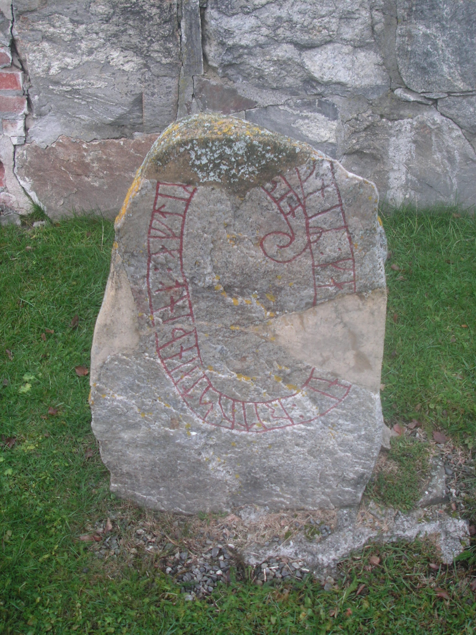 Runstenen vid Selångers kyrkoruin i Medelpad